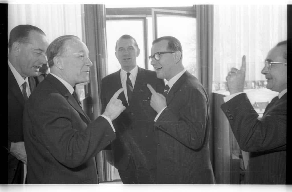 Empfang im Hotel Conti-Hansa im Schlossgarten 7. Im Bild v.l.n.r.: Staatsanwalt Heyck, franz. Botschafter Francois Seydoux de Clausonne, Landeswirtschaftsminister Ernst Engelbrecht-Greve, Landesinnenminister Hartwig Schlegelberger.